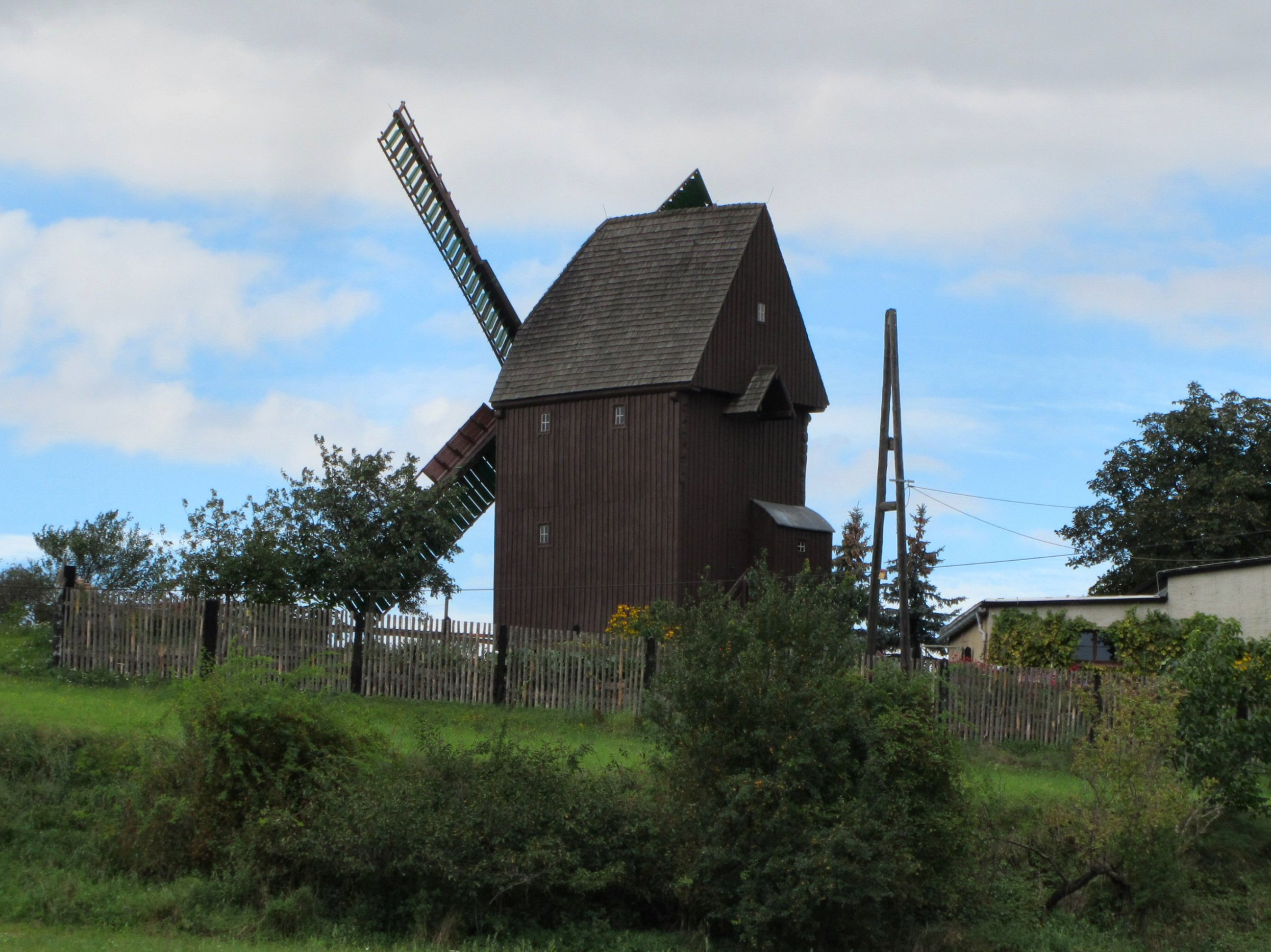 Schellsitz,Windmühle